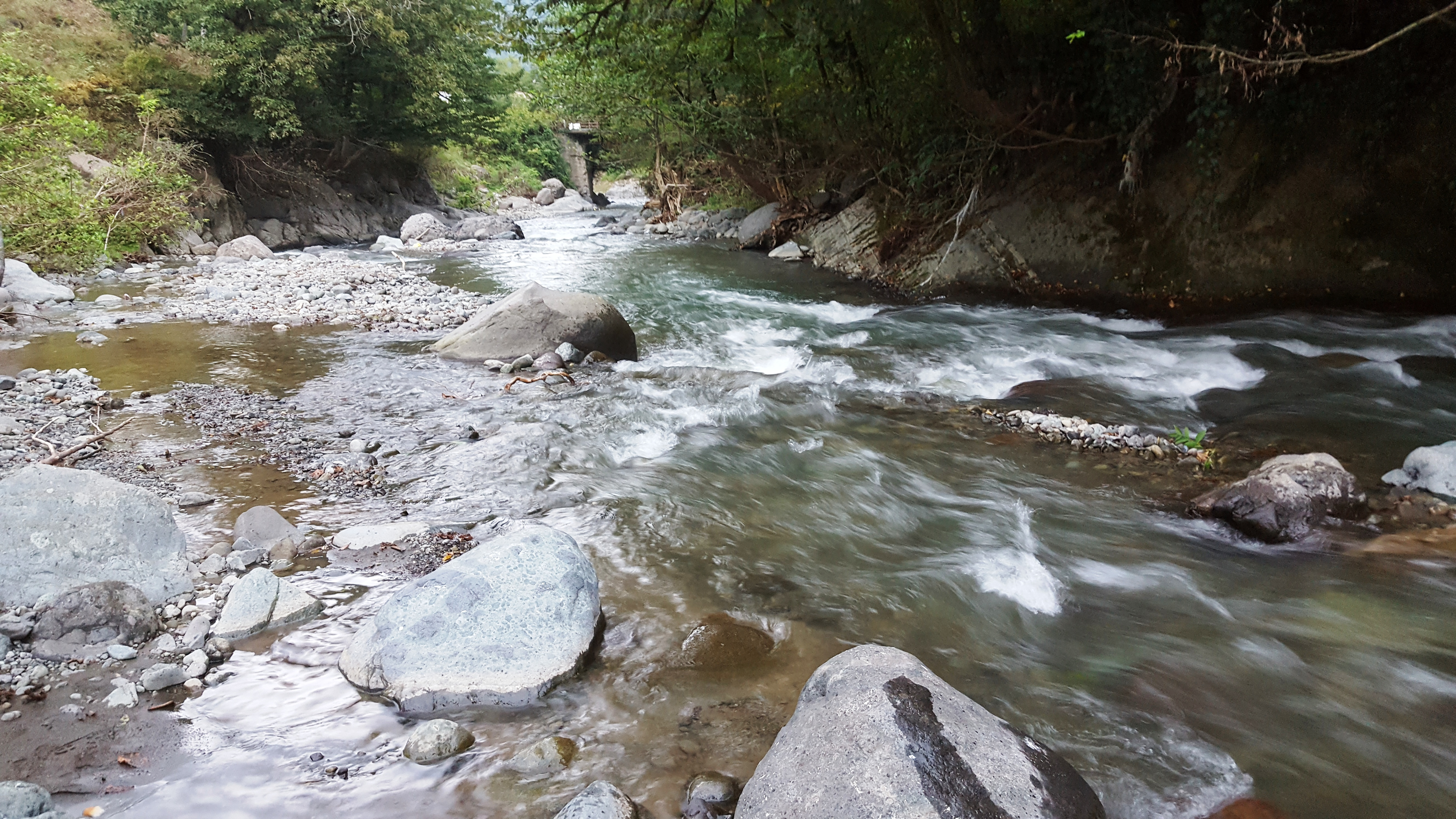 მდინარე სულორი სოფელ სულორში